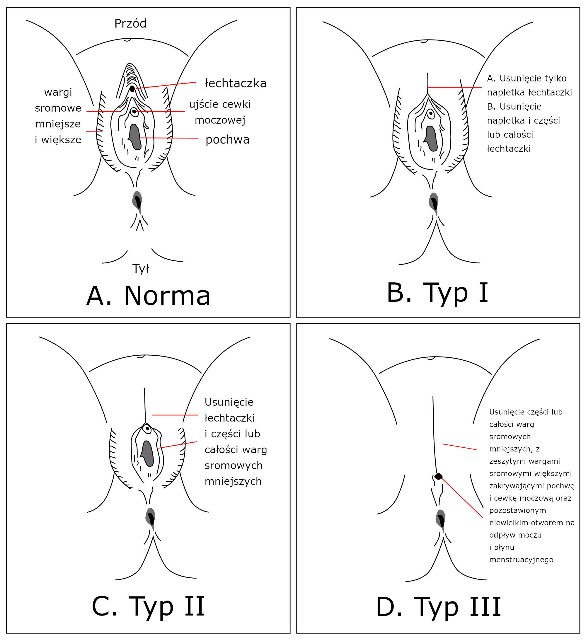 Okaleczanie żeńskich narządów płciowych - rodzaje